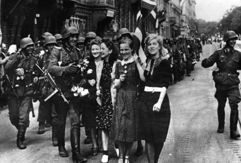 Scherl Bilderdienst Befreiungsjubel um die deutschen Soldaten in Riga. Als die deutschen Truppen die Stadt Riga einnahmen, wurde die dortige Bevölkerung von einem Jubelsturm der Freude erfasst. Die Menschen, die monatelang unter dem Blutterror gelitten und sich in den letzten Wochen in den Kellern ihrer Häuser versteckt hatten, eilten nun auf die Straßen und Plätze und drängten sich, um die deutschen Soldaten zu begrüßen. PK Lette, 7.7.41 [Herausgabedatum]